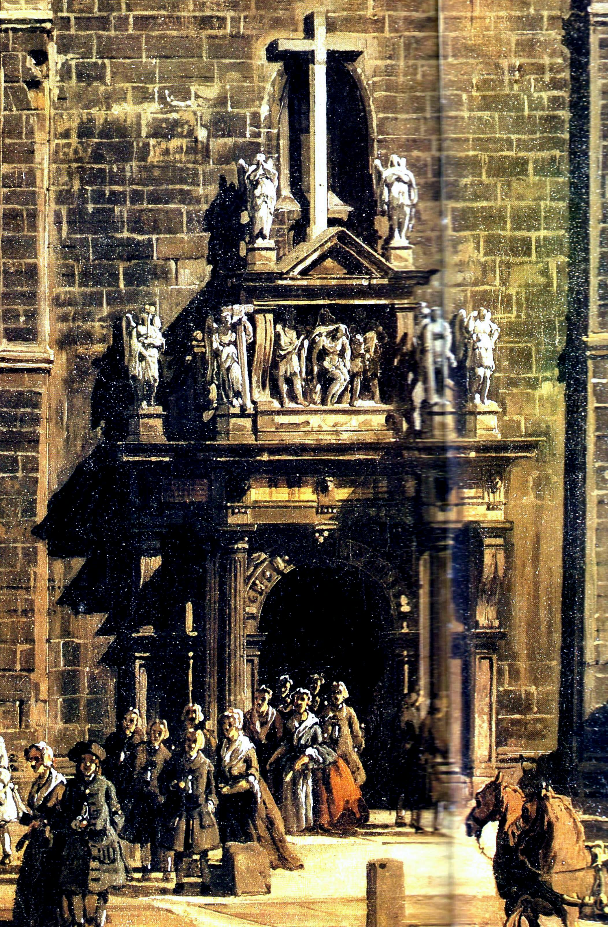 circa 1730, detail: Portal